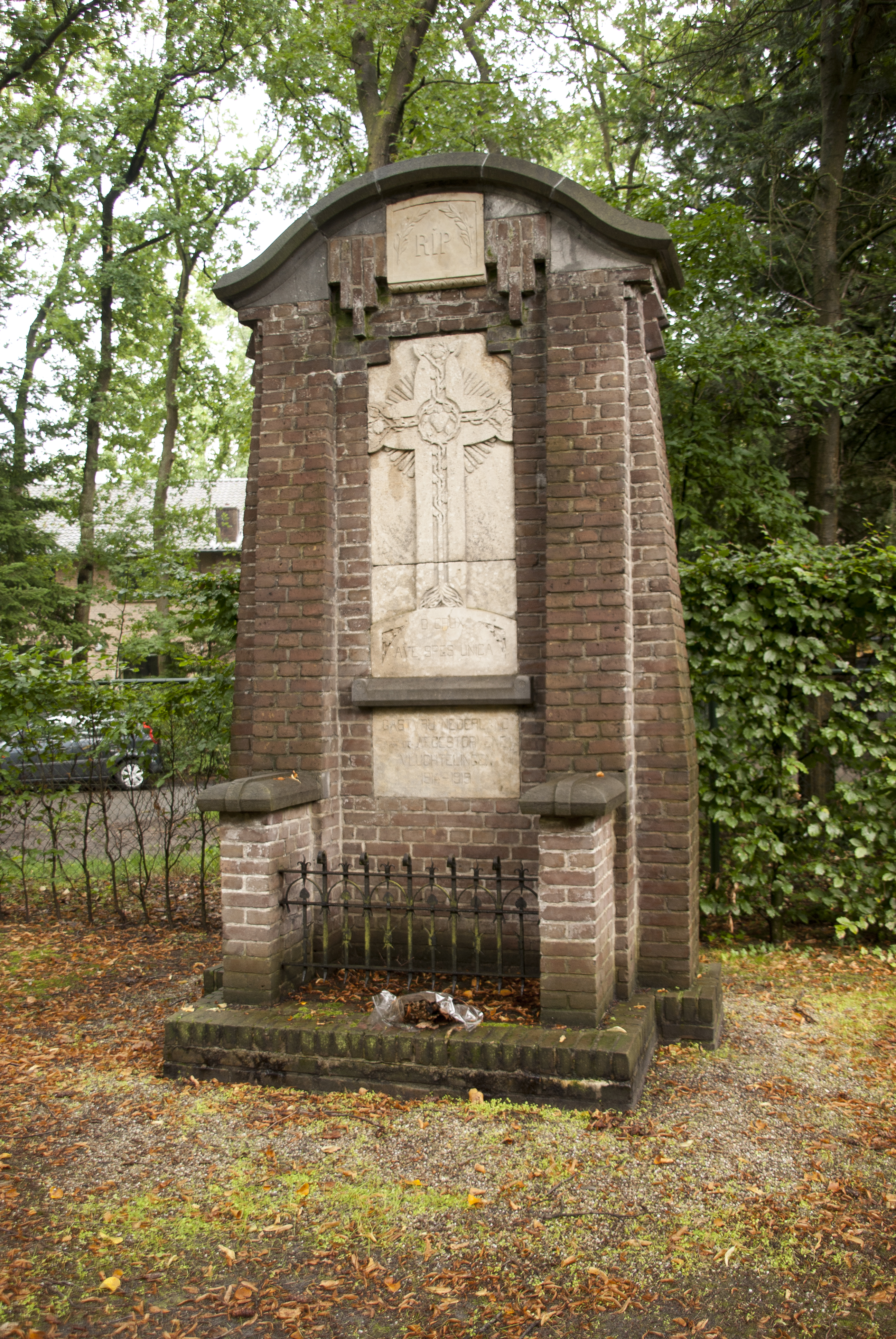 Gedenkteken Eperweg 22 Nunspeet